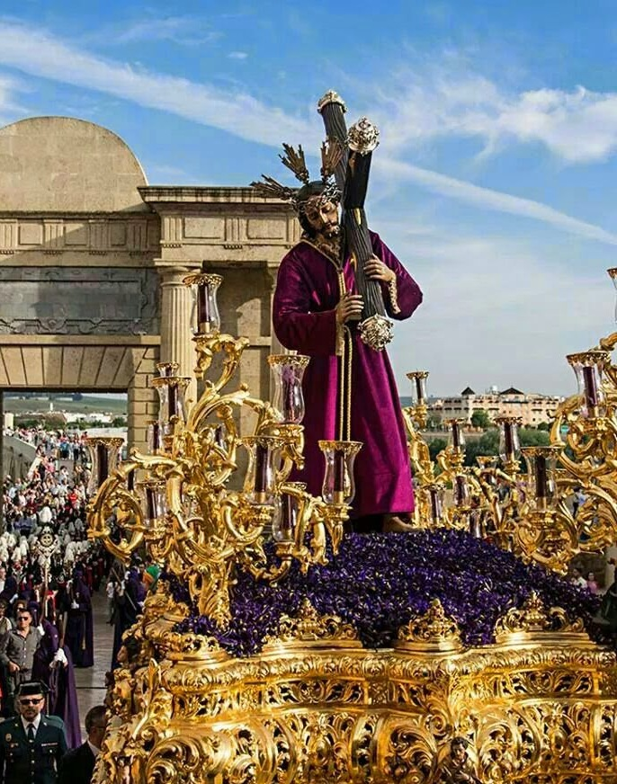 Ntro Padre Jesús del Calvario en su paso por la Mezquita